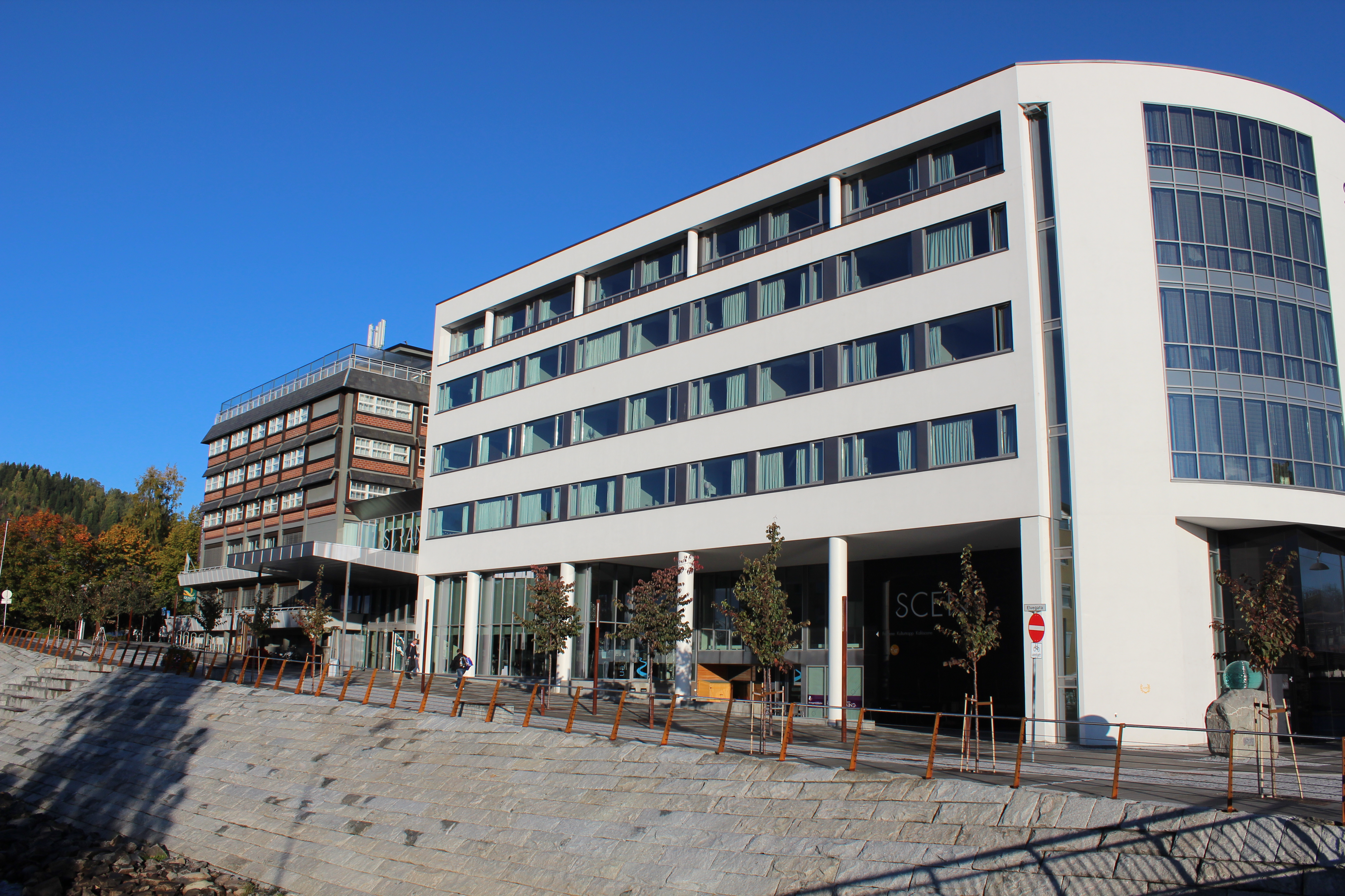 Gjøvik Kultursenter fra øst.